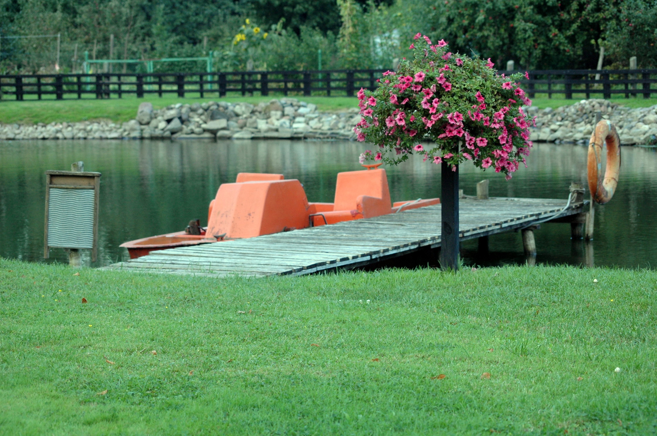 Staw w Uninie.